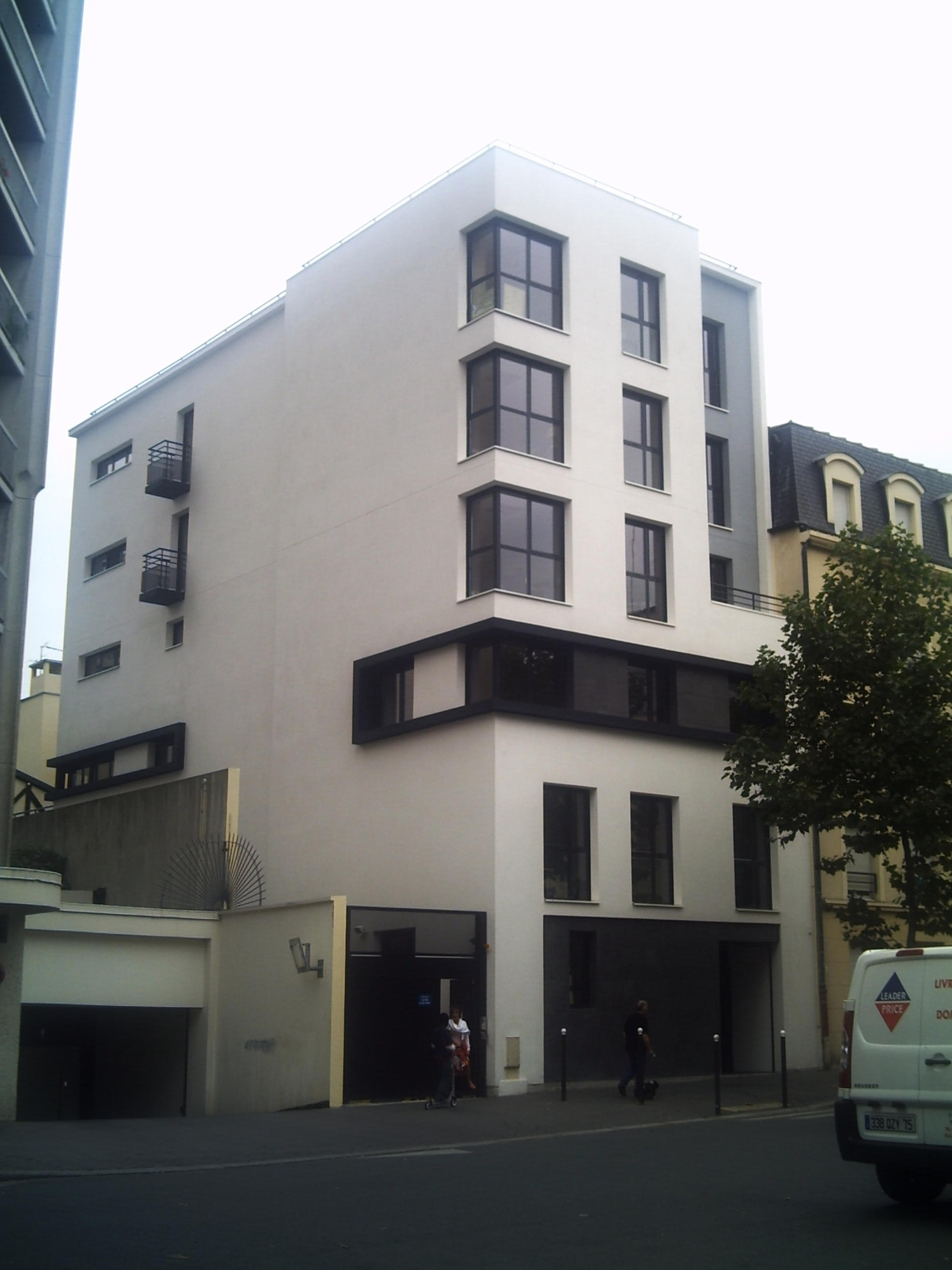 Le nouveau siège de la Fédération française Le Droit Humain 9 rue Pinel à Paris